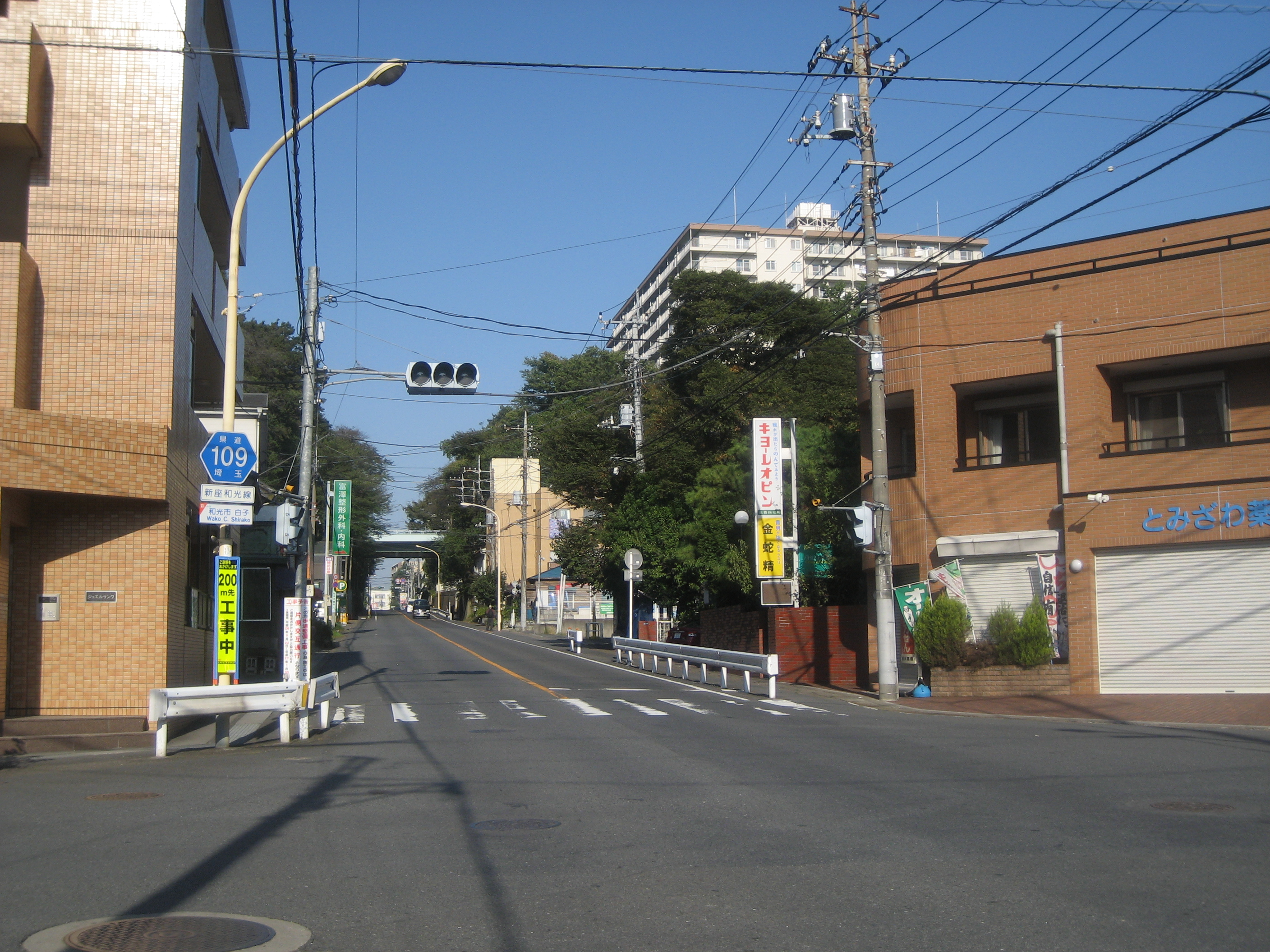 埼玉県道109号線和光市白子付近（朝霞方面を撮影）